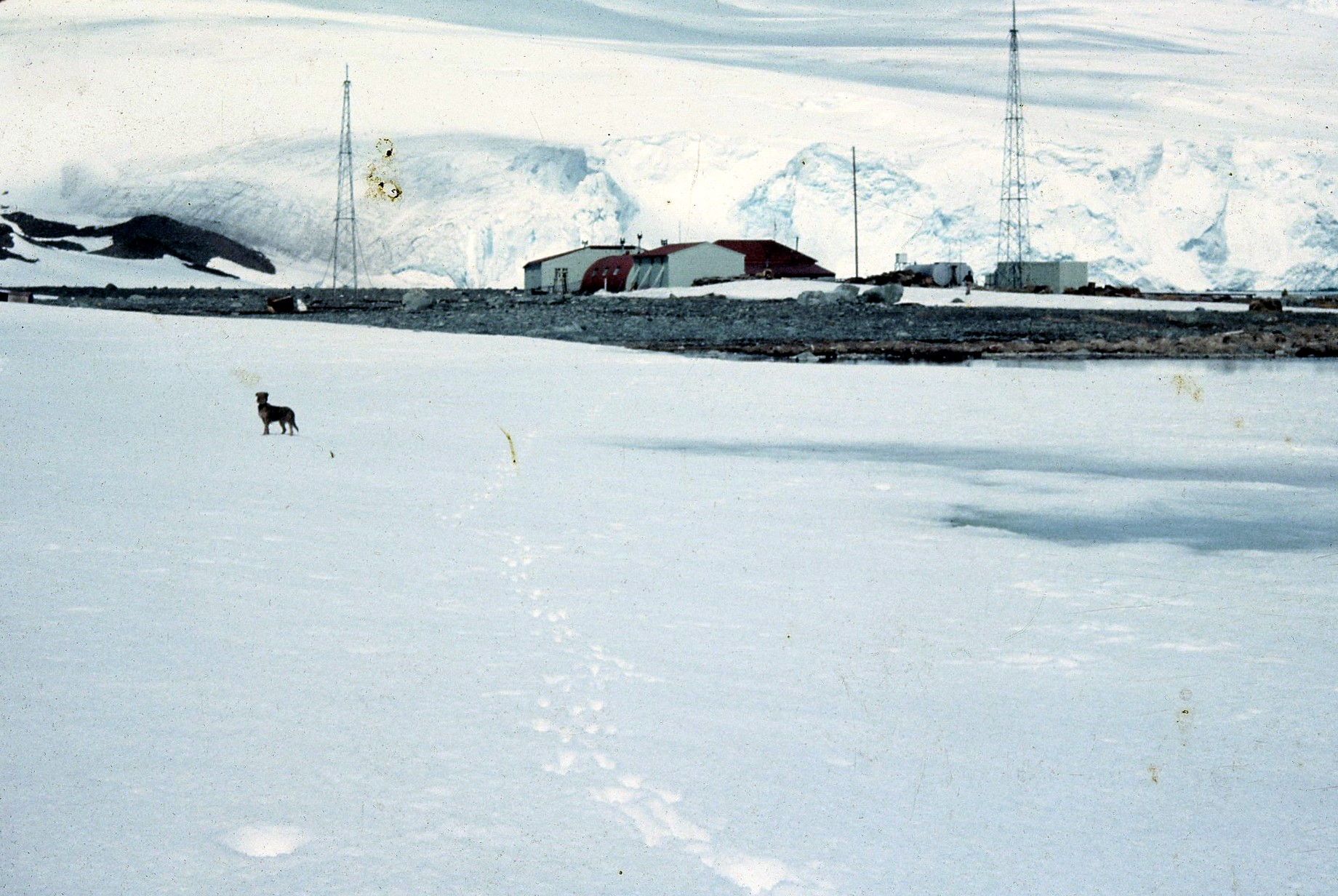 La base chilena Arturo Prat. Ubicada en Puerto Soberanía, isla Greenwich. El perro es Estopin del patrullero Lientur